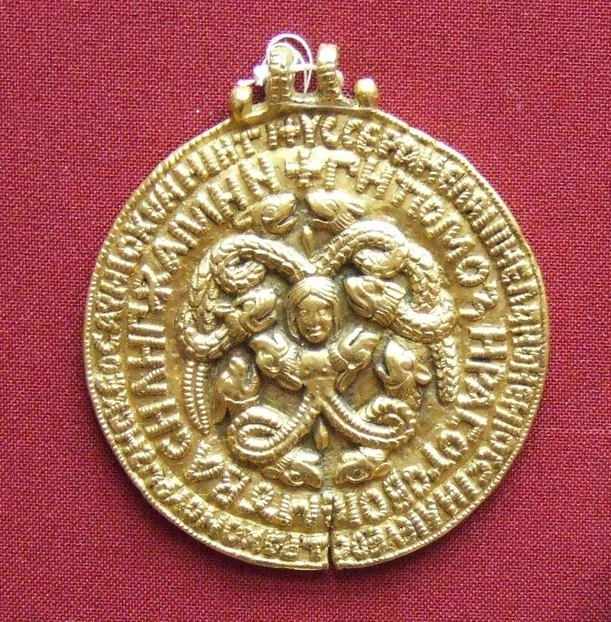 ЗМЕЕВИК («ЧЕРНИГОВСКАЯ ГРИВНА»). XI век. Киев. Золото; литье по восковой модели, чеканка. 7,8 х 7,4 х 1. Поступил в 1930 году из Эрмитажа. Найден в 1821 году под Черниговом у деревни Белоусовой. ГРМ. инв. БК 2746